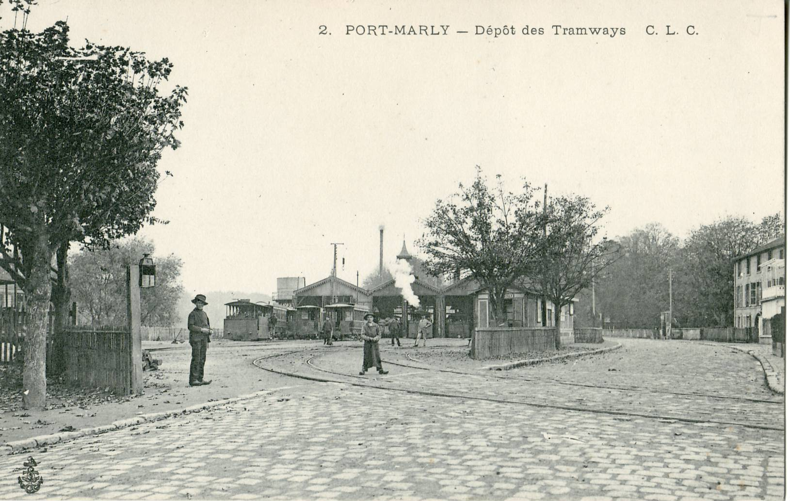 Carte postale ancienne éditée par CLC Ancre n°2 : PORT-MARLY - Dépôt des Tramways (Compagnie du tramway à vapeur de Paris à Saint-Germain (PSG))